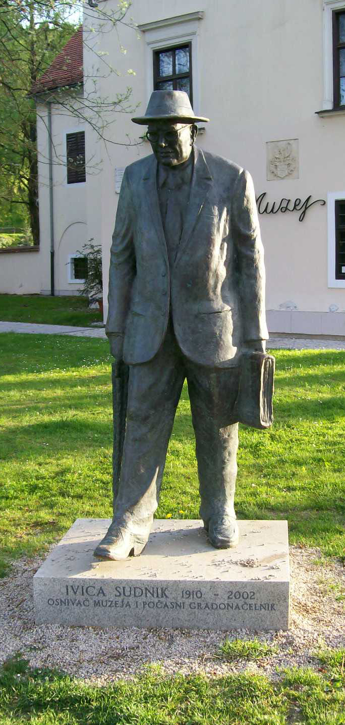 Ivica Sudnik Samobor